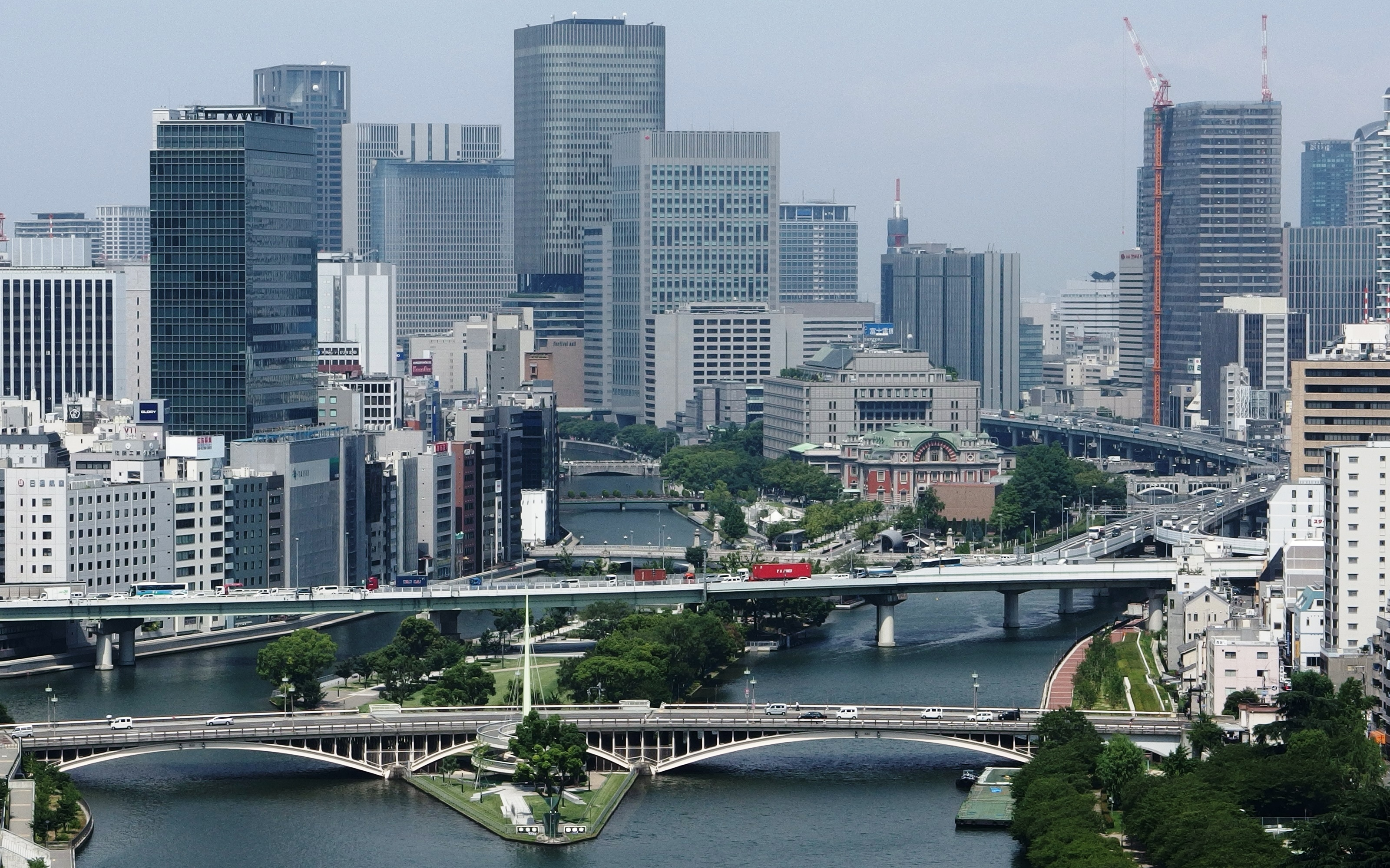 中之島を東から望む